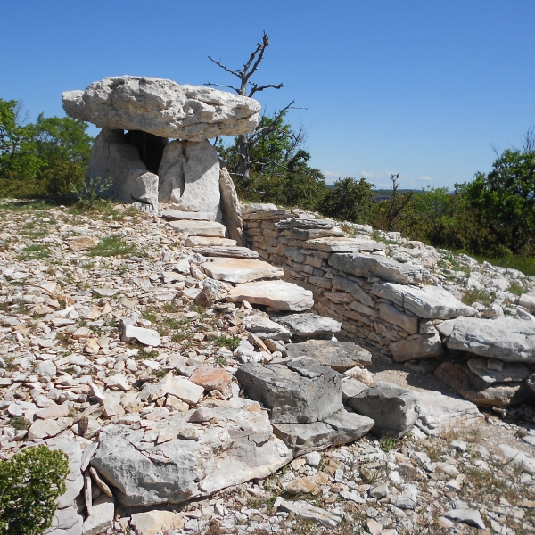 Dolmen de la Prunarède sur le domaine de la Prunarède